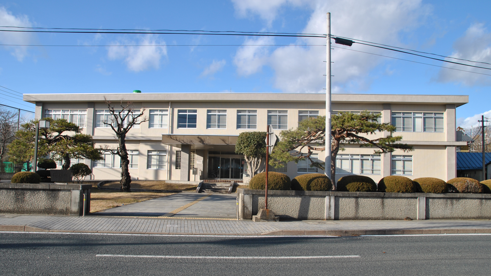 相馬簡易裁判所